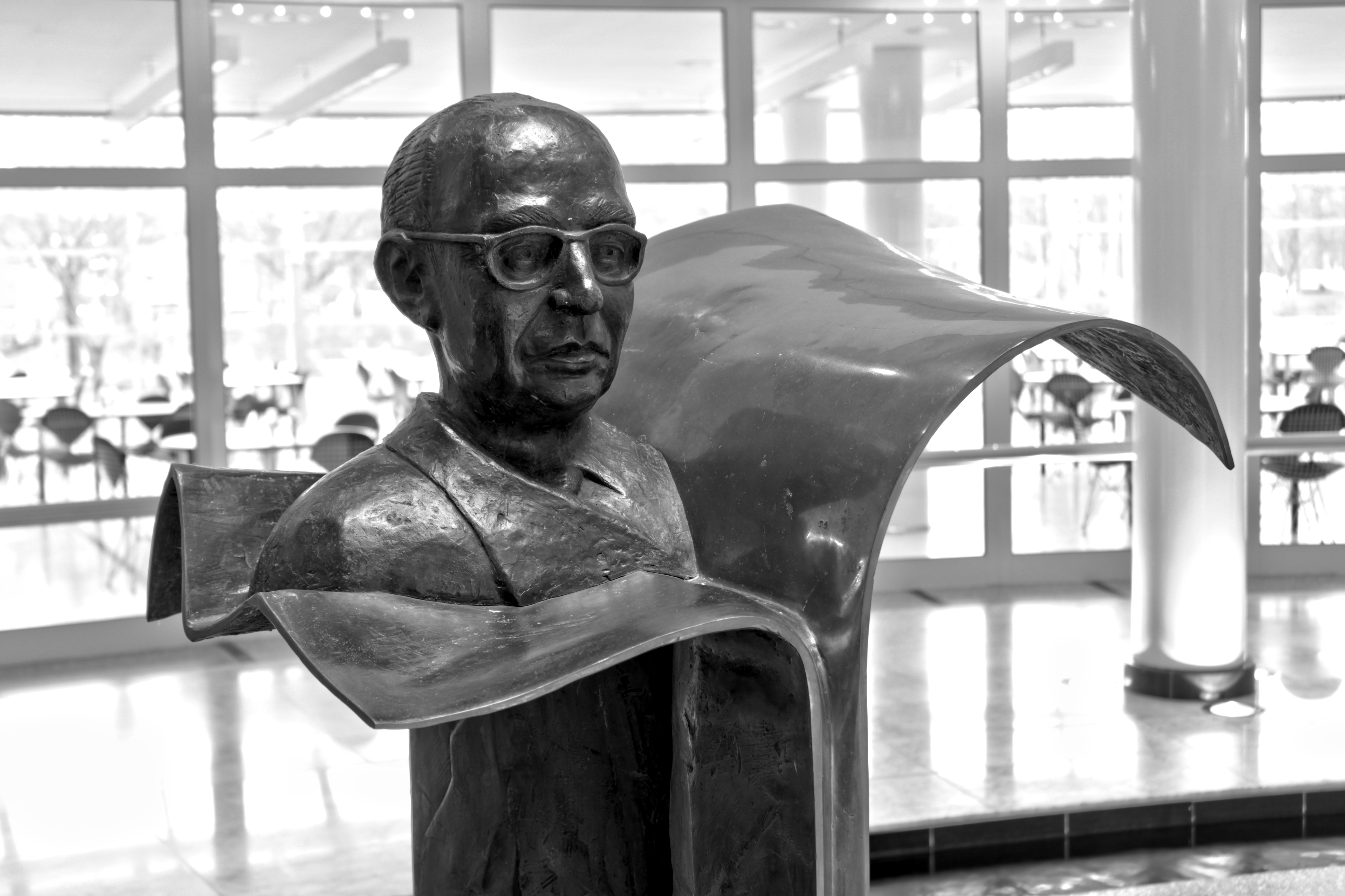 Büste von Heinz Heise im Foyer des Verlagsgebäude in Hannover, Bronze, Künstler: Heinz Anneser, 2001